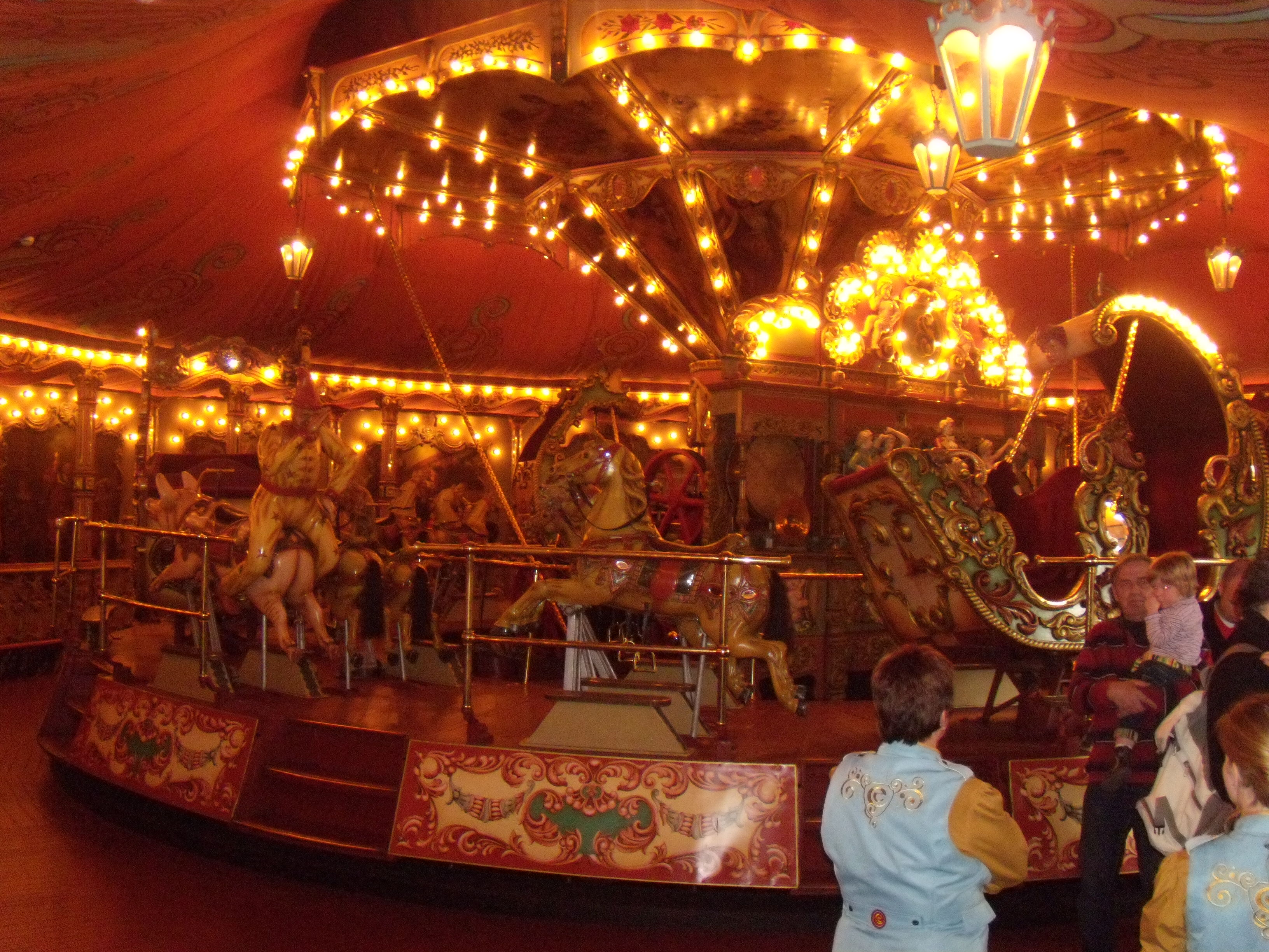 Stoomcarrousel - Grand carrousel dans le parc d'attractions néerlandais Efteling.